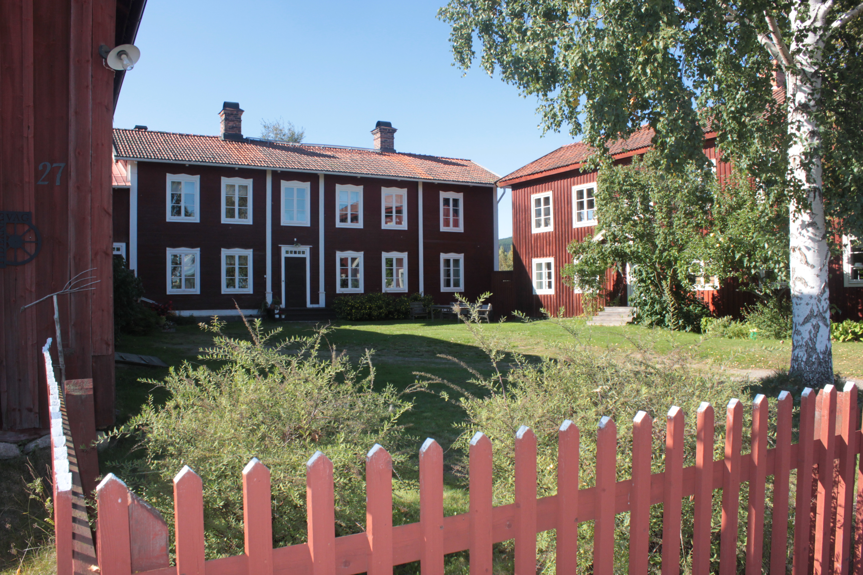 Gästgivars med den högra byggnaden.